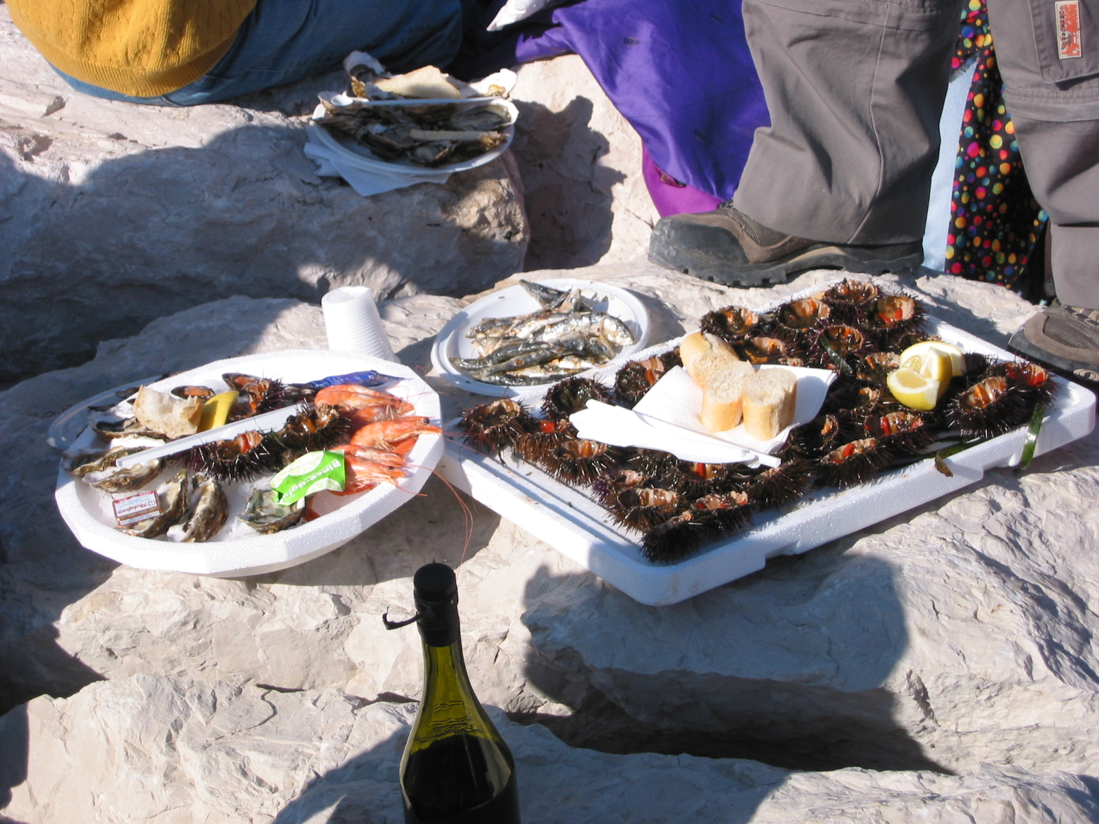 Les Oursinades sur le port de Carry-le-Rouet, Bouches-du-Rhône, France